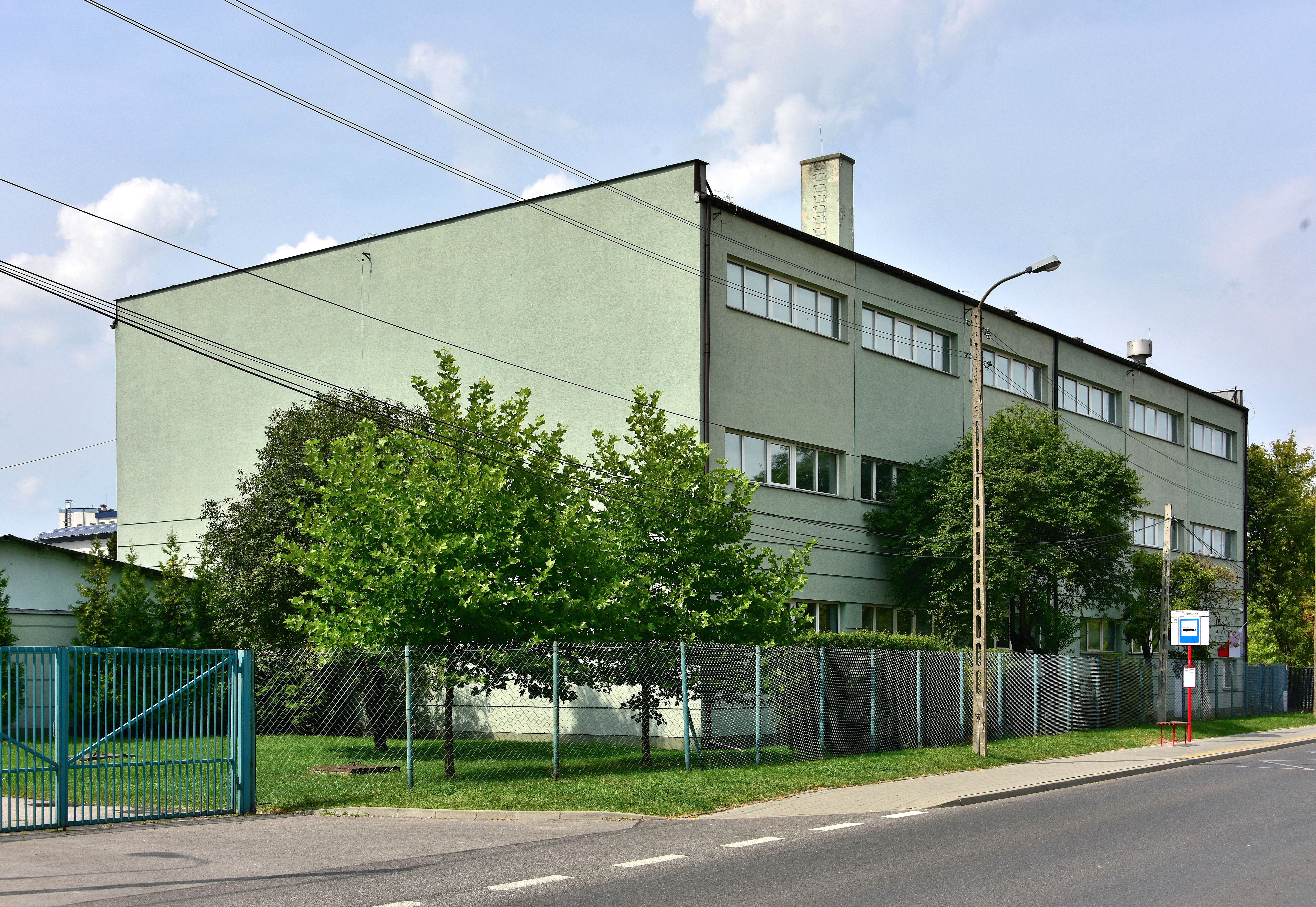 Magazyny Centralne Ministerstwa Spraw Zagranicznych przy ul. Tanecznej 73 w Warszawie